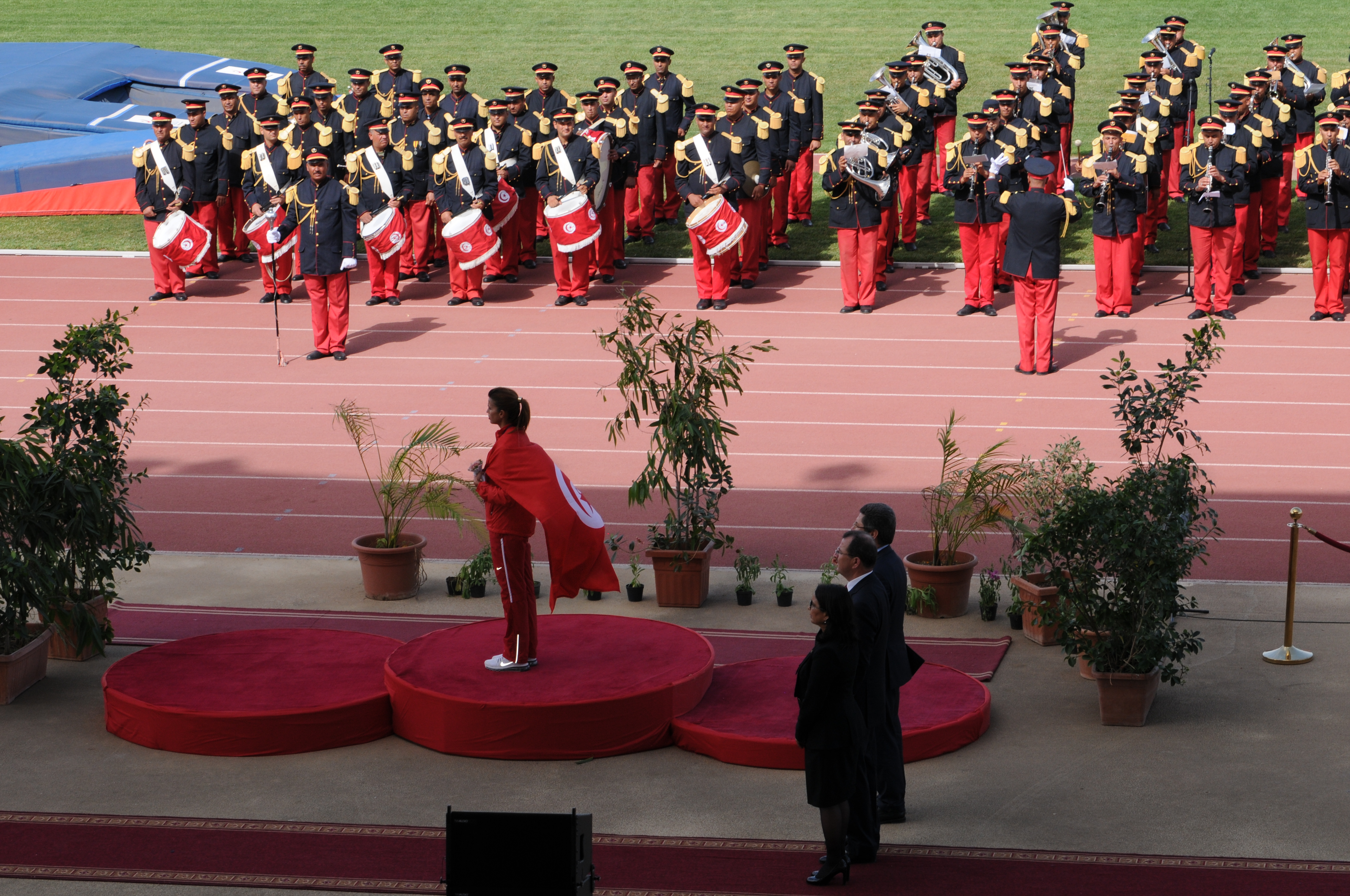 Habiba Ghribi lors de la cérémonie de remise de la médaille d'or des JO 2012